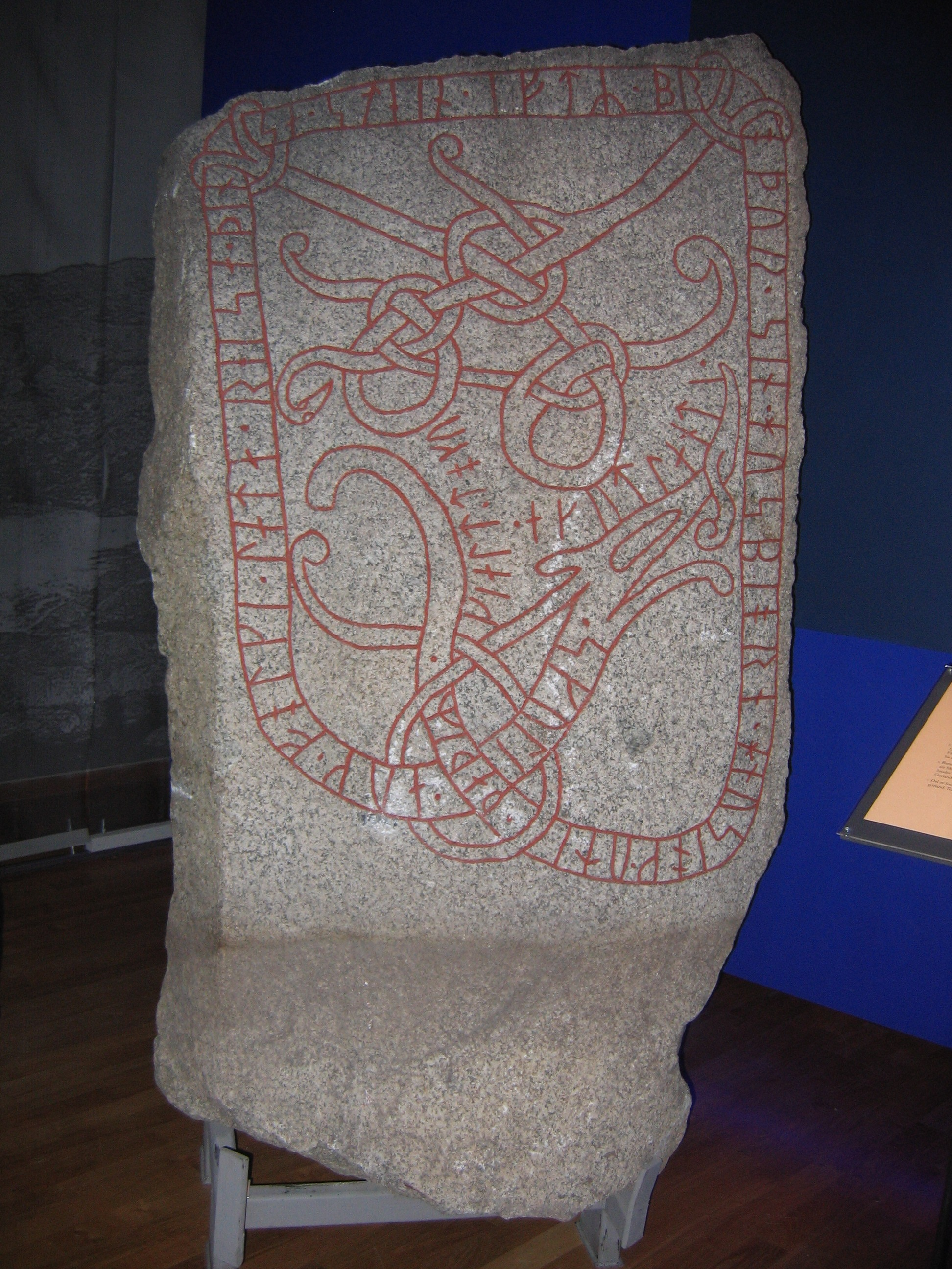 runestone